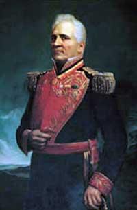 Retrato del General José Laurencio Silva (1791 - 1873) por Martín Tovar y Tovar (1827 - 1902)